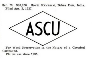 ASCU trademark